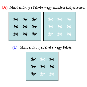 Kvantor (logika)